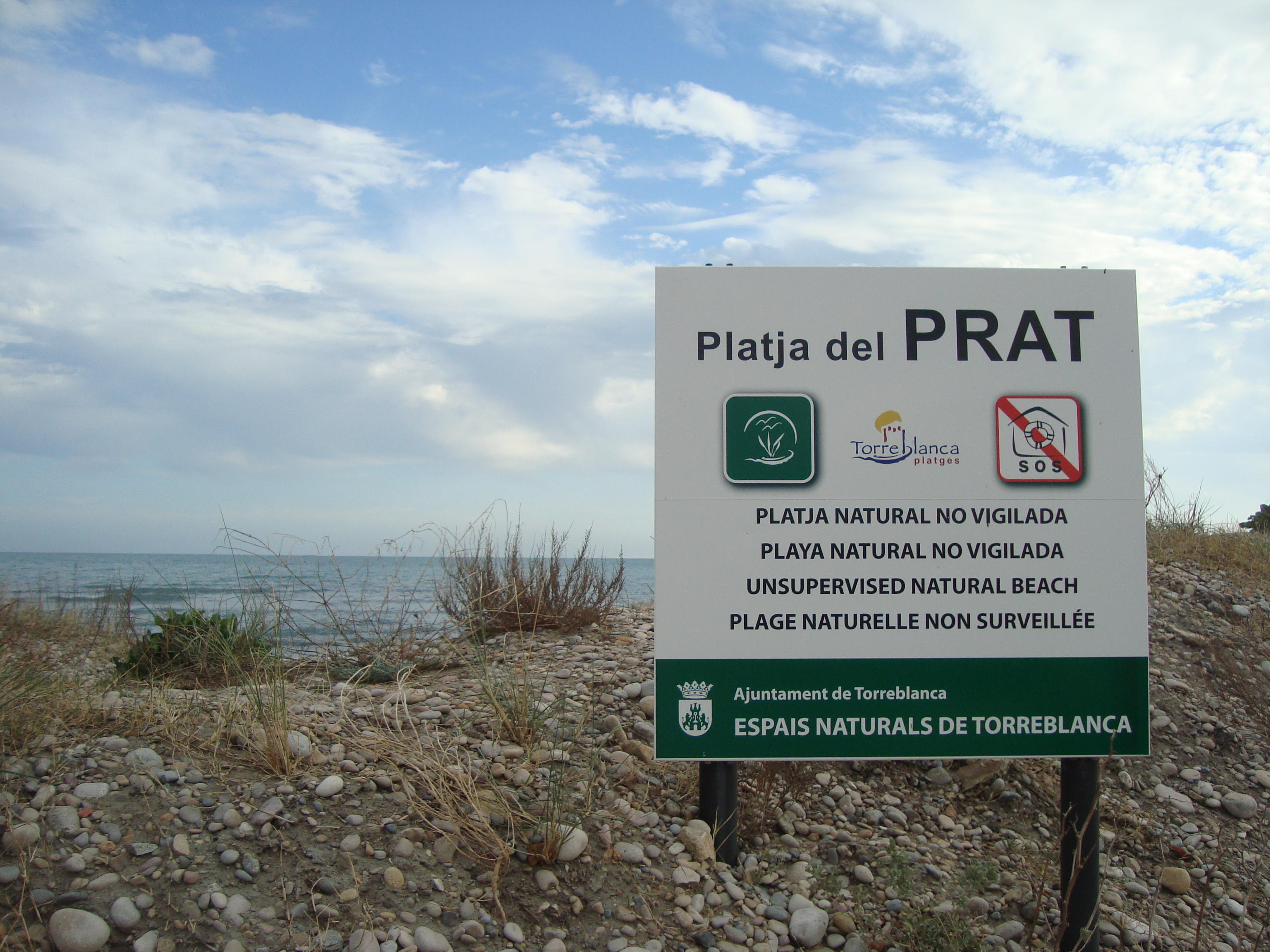 Cartel informativo de la Playa del Prat, playas de Torreblanca